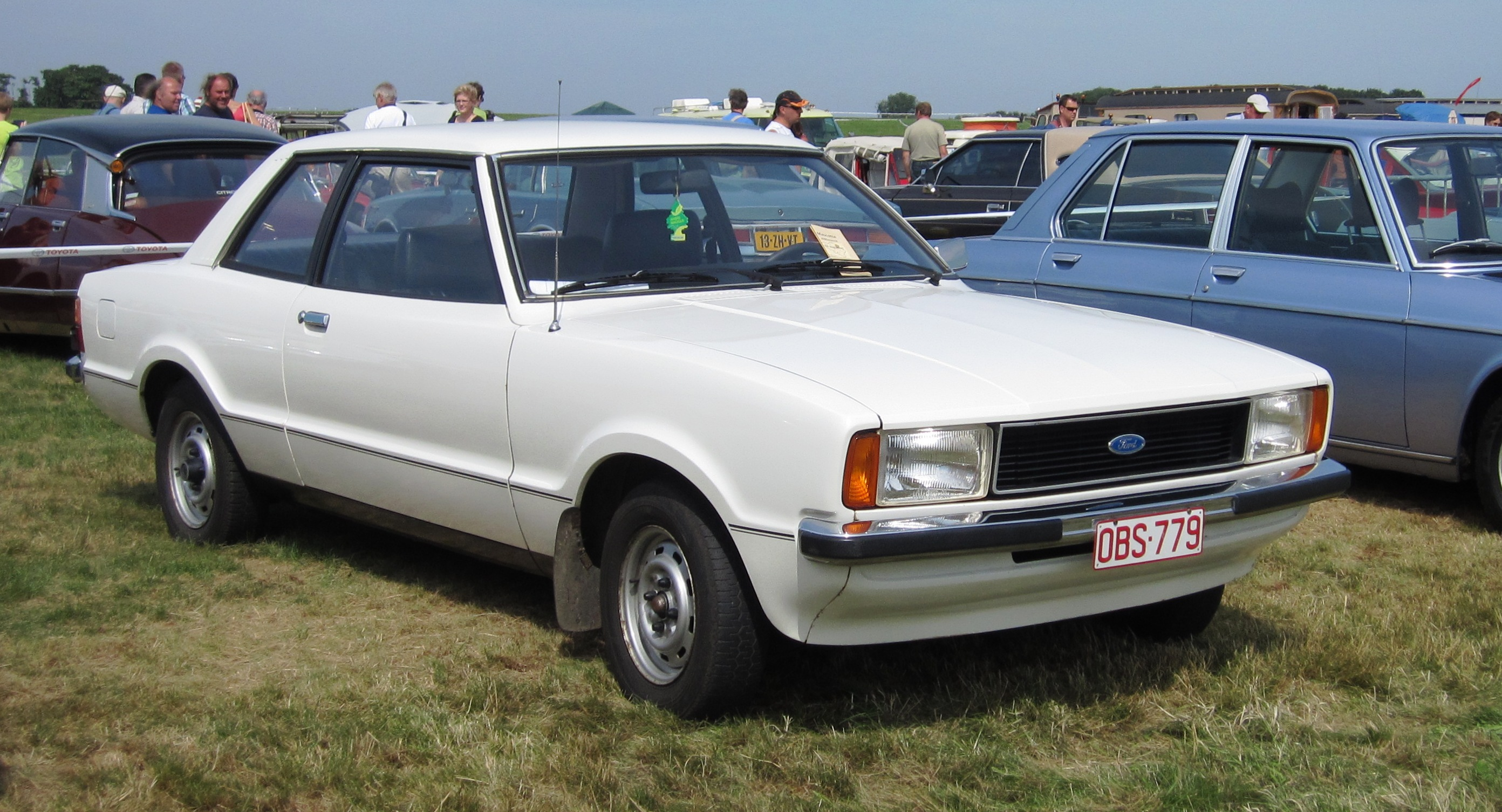 Ford Taunus 1.3 L a 2 portes